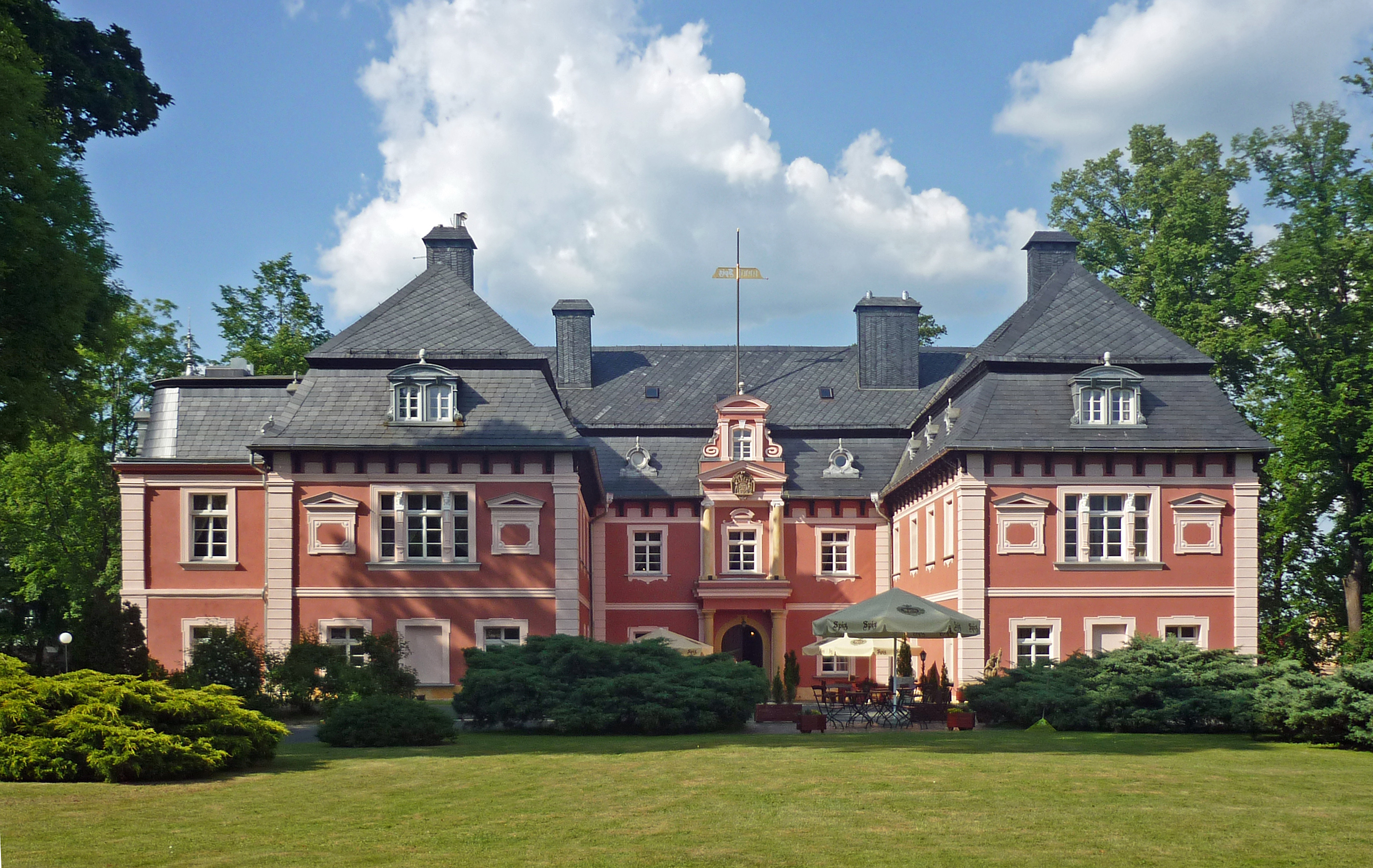 Schloss Arnsdorf (Miłków) im Riesengebirge